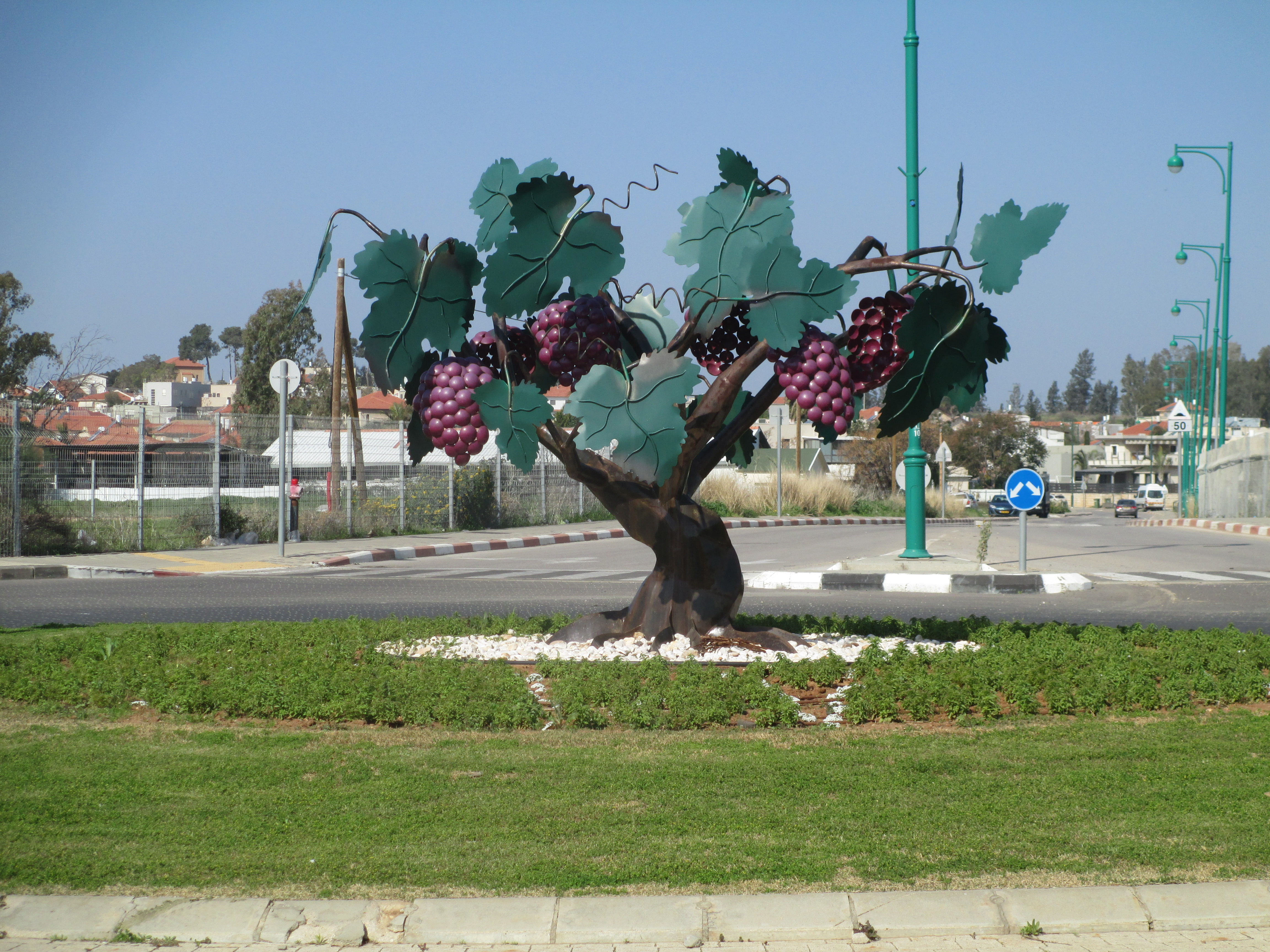 פסל של גפן וענבים בחדרה, רחוב ליאור בוקר. הפסל - ישראל פרימו